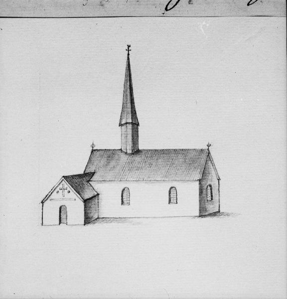 Vittinge kyrka, teckning av Johan Peringskiöld ur hans skrift Monumenta ullerakerensia...; eller Ulleråkers Häradz minnings-merken, med Nya Upsala (1719).